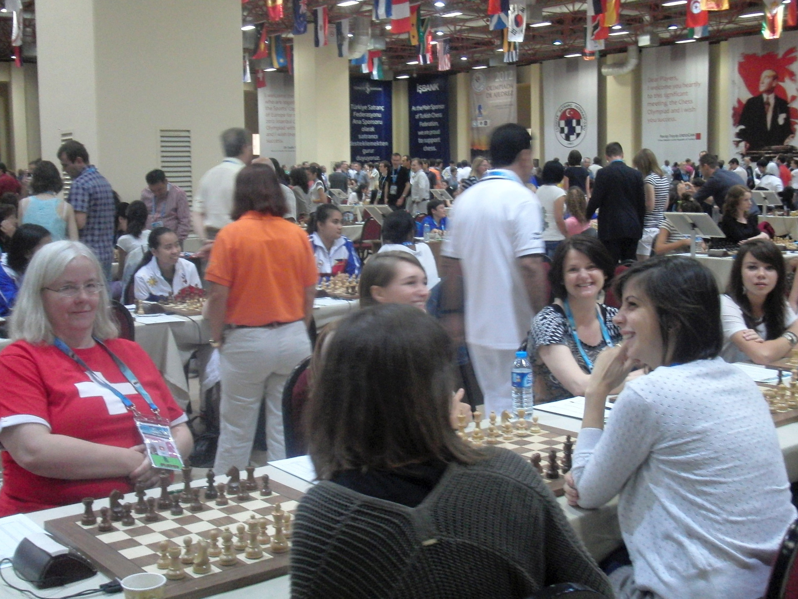 Links die Schweizer Damen gegen Montenegro, 5. Runde der Schacholympiade 2012 in Istanbul. Auf der linken Seite spielen Barbara Hund, Monika Seps, Gundula Heinatz und Laura Störi, rechts sitzen Jovana Vojinović und Aleksandra Milović.